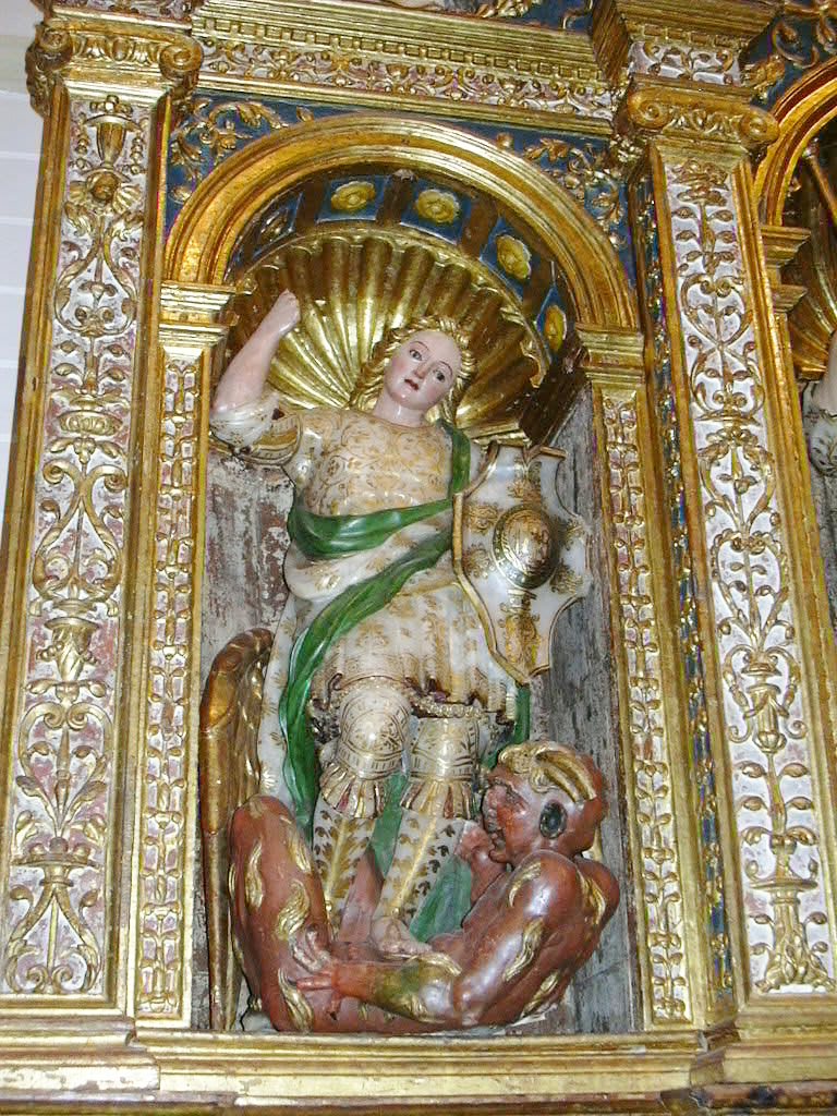 Detalle del retablo de Santiago - San Miguel. Colegiata de Bolea (Huesca, España)